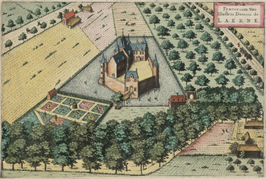 Kasteel van Laarne in de eerste helft van de 17e eeuw (afbeelding uit Flandria Illustrata - 1641)